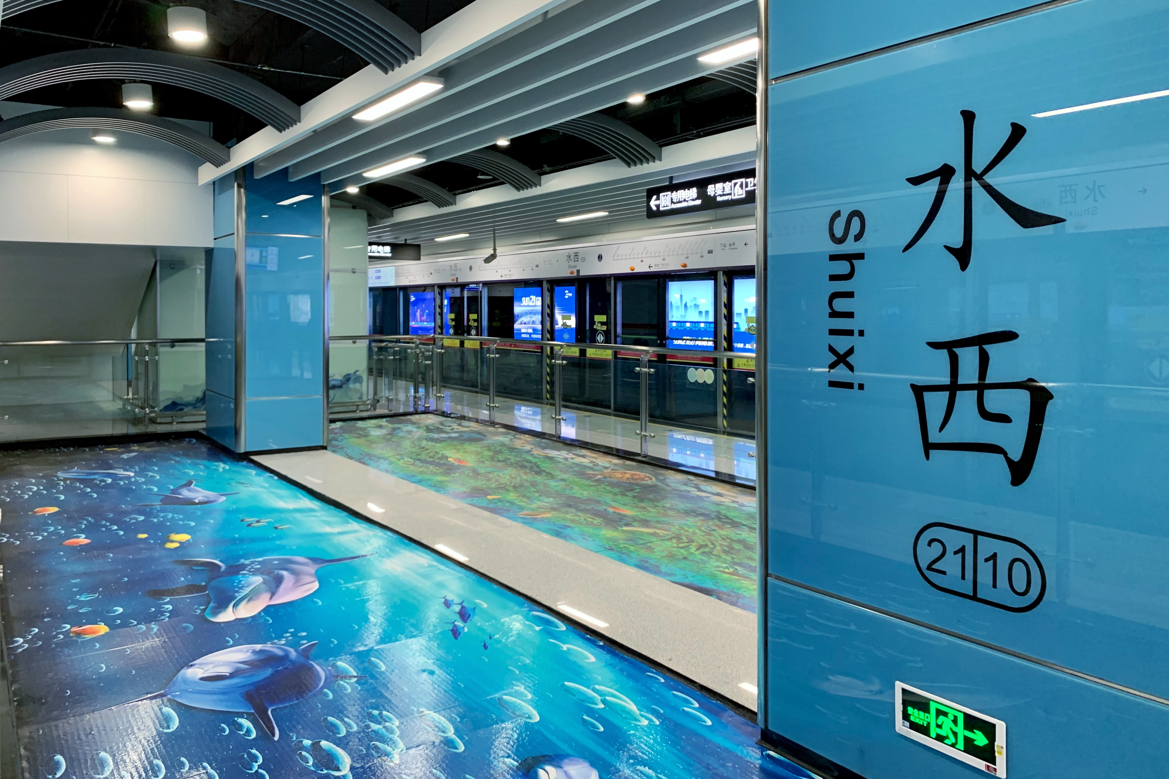 广州地铁水西站